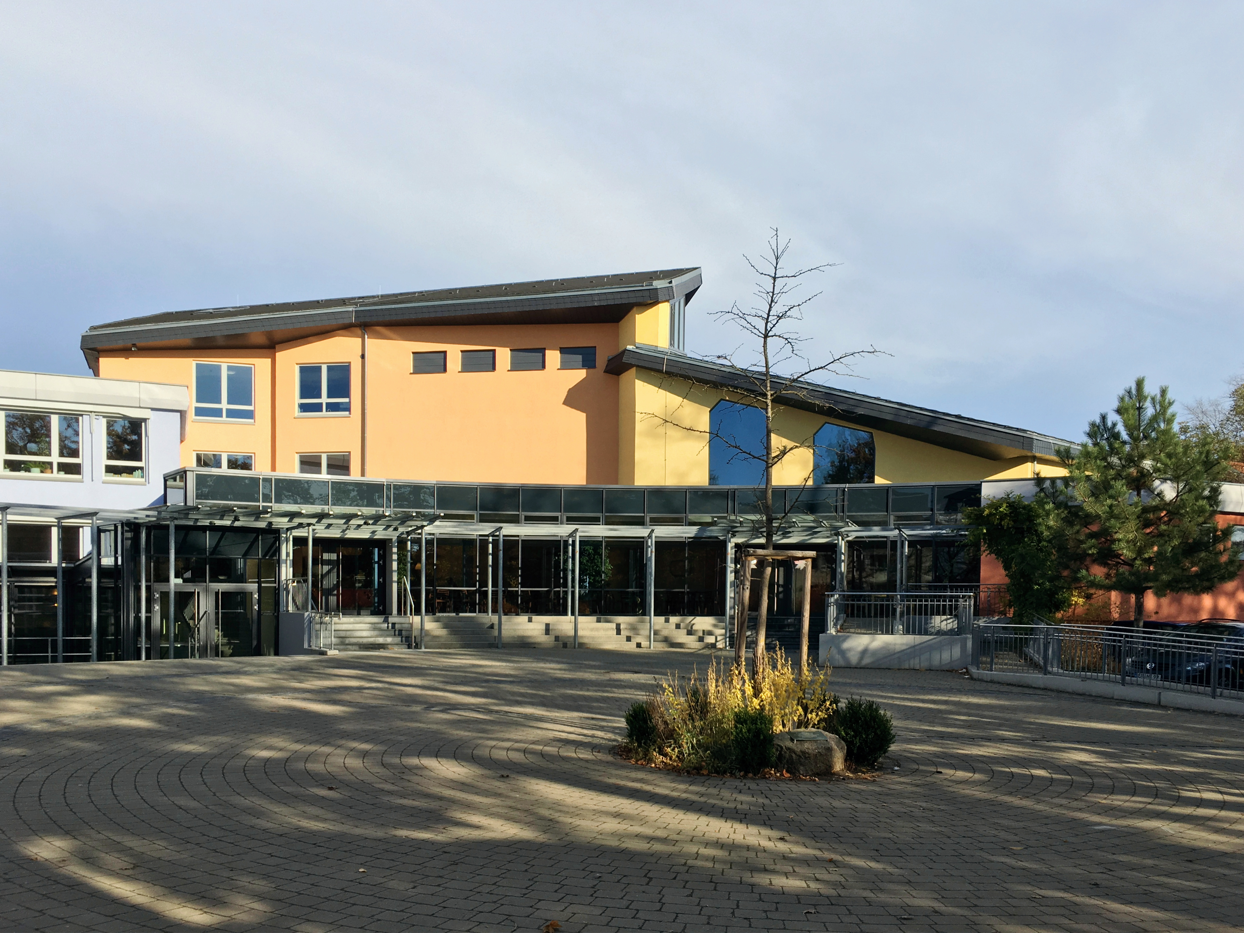 Rudolf Steiner Schule in Nürnberg 2018